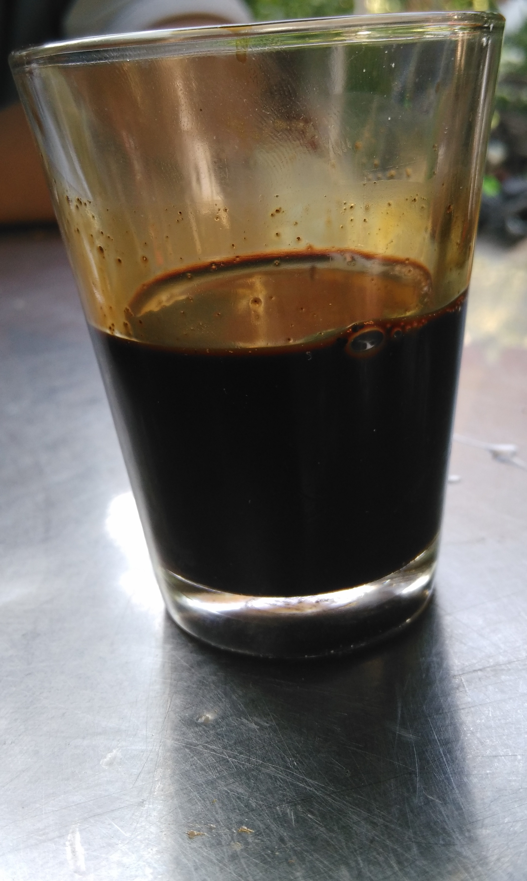 Hình chụp về một ly cà phê sữa nóng bình dân tại quán cà phê Bảo Nam, Bình Tân, TP.HCM. Ly cà phê có chế thêm nhiều hương liệu là phụ phẩm (bột bắp xay rang cháy khét) để tăng thêm hương vị, phù hợp với thị hiếu thưởng cà phê dựa trên hương vị là chính chứ không phải là mùi vị như ở nước ngoài